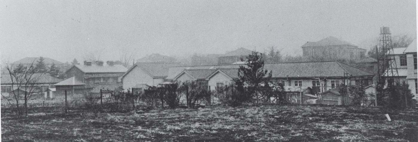 渋谷時代の校舎